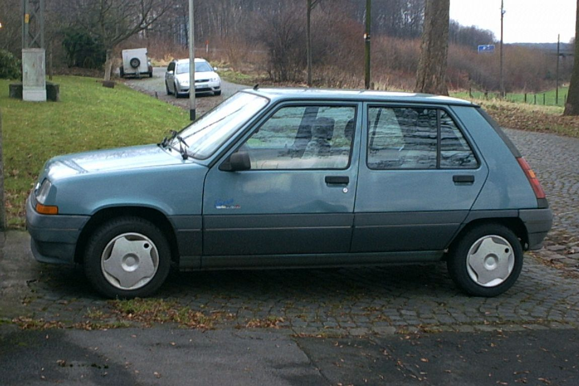 Renault 5, Zweite Generation, 5-türig.